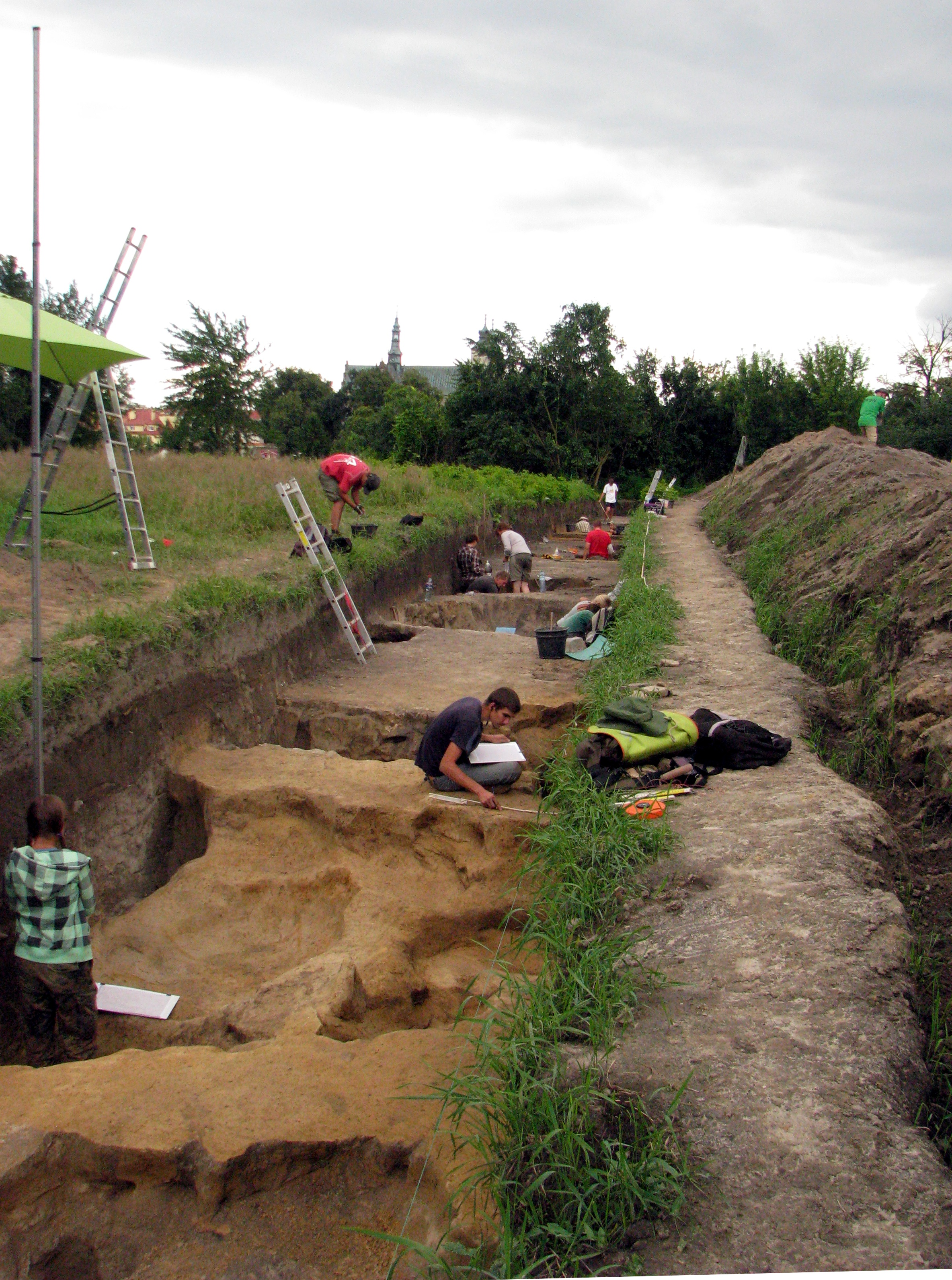 Badania archeologiczne prowadzone w 2011 r. przez Uniwersytet Kardynała Stefana Wyszyńskiego w Warszawie w miejscu dawnej osady Żmigród (skrzyżowanie ulic Bernardyńskiej i Klasztornej) w Opatowie, Polska. Odkryto m.in. profil wału obronnego, pozostałości domostw i fragmenty naczyń z okresu XII – XIII wieku.